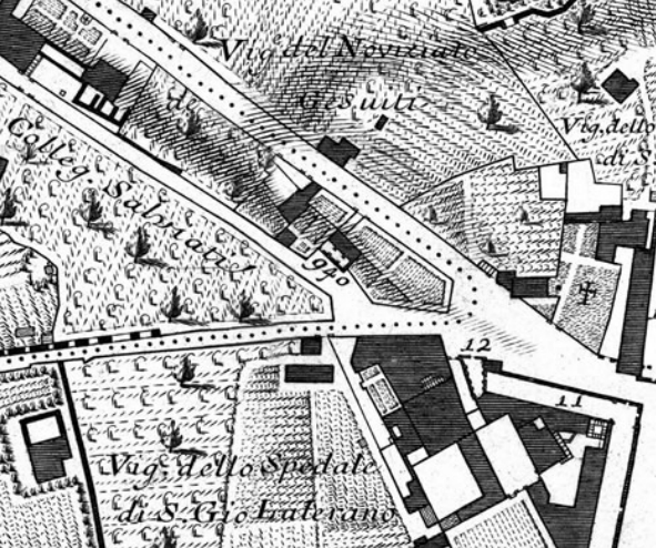 Pianta di Nolli